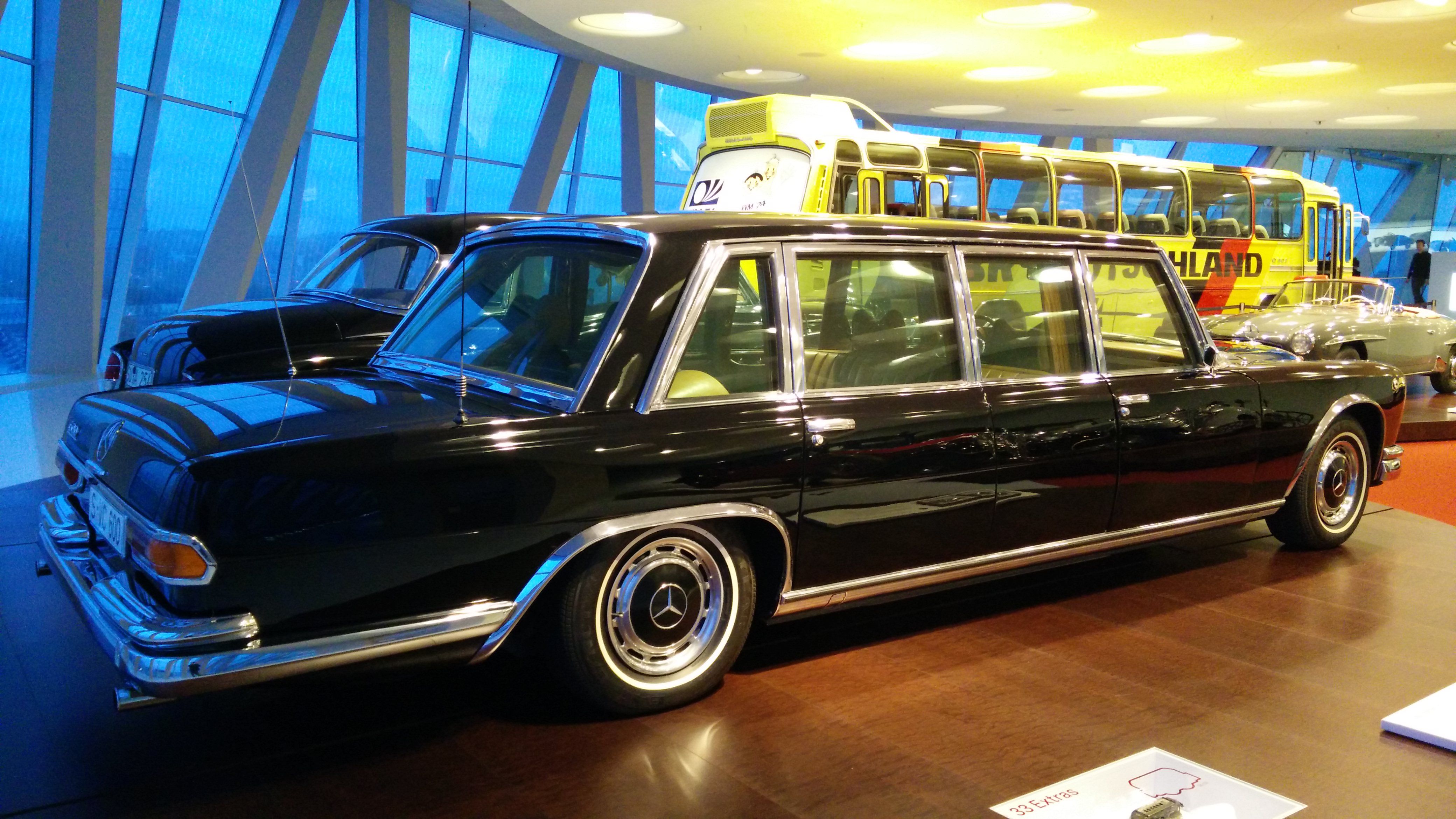 IMG_20141112_163609